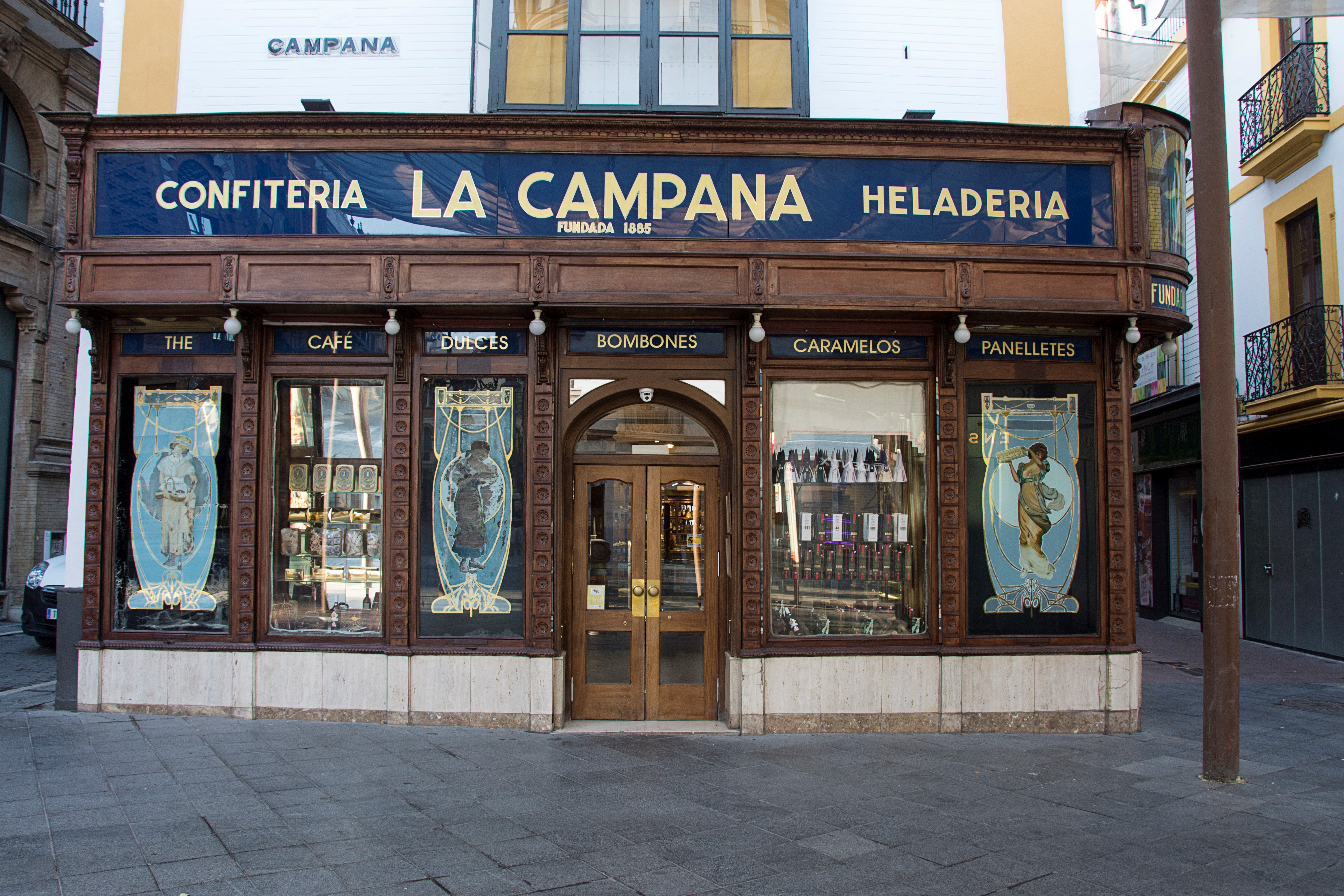 Confitería La Campana, en la calle del mismo nombre, en Sevilla.